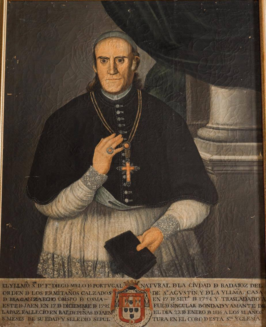 Fray Diego Melo of Portugal, Bishop of Jaén (1795-1816).